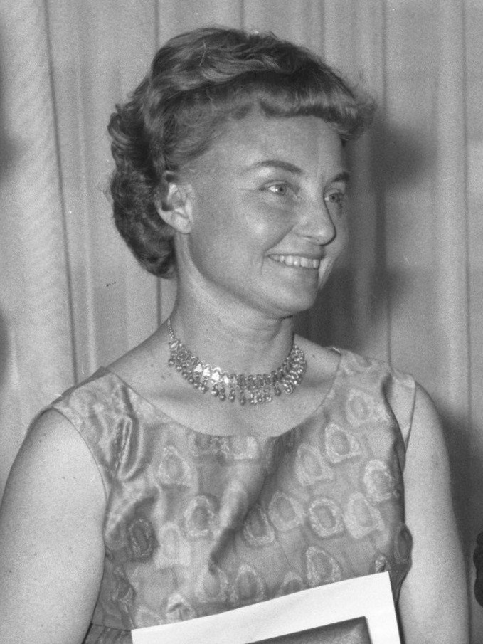 Uitreiking ANWB-prijzen voor letteren, journalistiek en televisie. In het midden de prijswinnaars illustratrice Jenny Dalenoord, schrijfster An Rutgers van der Loeff-Basenau en radio- en televisiespreker dr. Leo van Egeraat [geheel rechts W.A. Offerhaus, voorzitter van de ANWB. Geheel links prof. Prakke? voorziter van de jury]